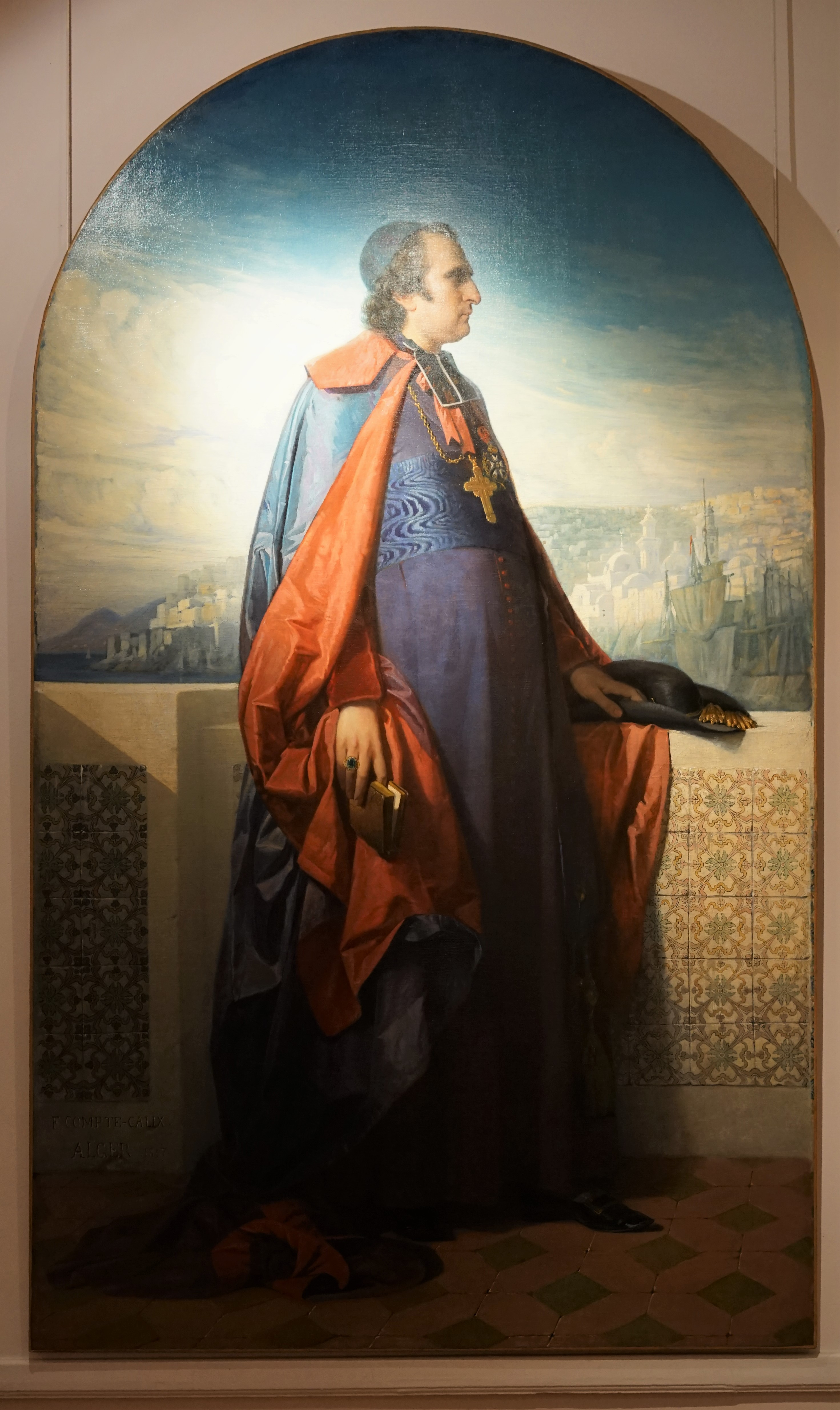 Cardinal Louis Antoine Auguste Pavy (1805-1866), premier évêque d'Alger par François Claudius Compte-Calix (1813-1880), tableau appartenant au musée Déchelette de Roanne